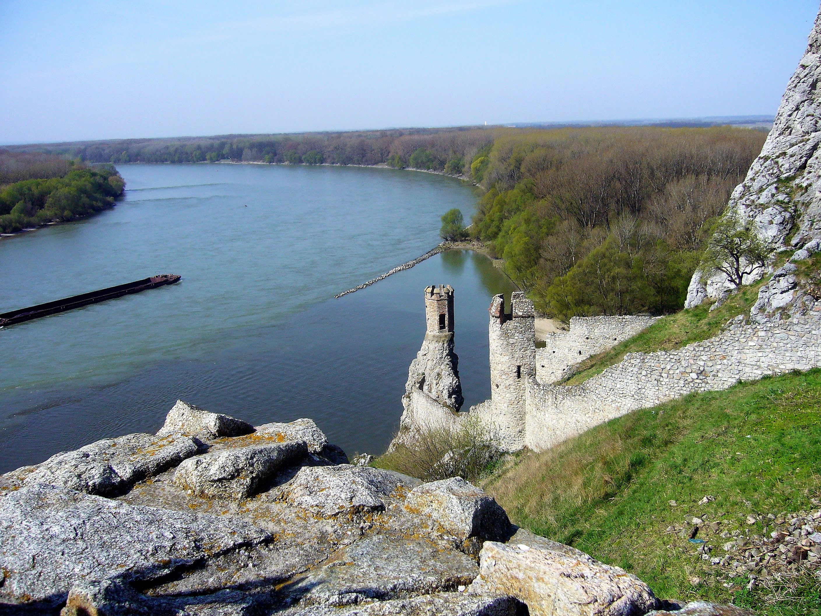 The confluence Morava and Danube by Devín castle